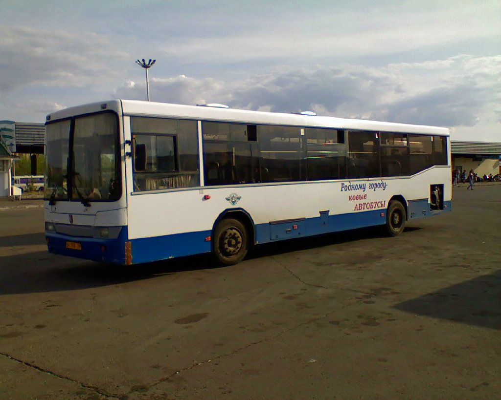 Автобус НефАЗ в Набережных Челнах (Автовокзал)